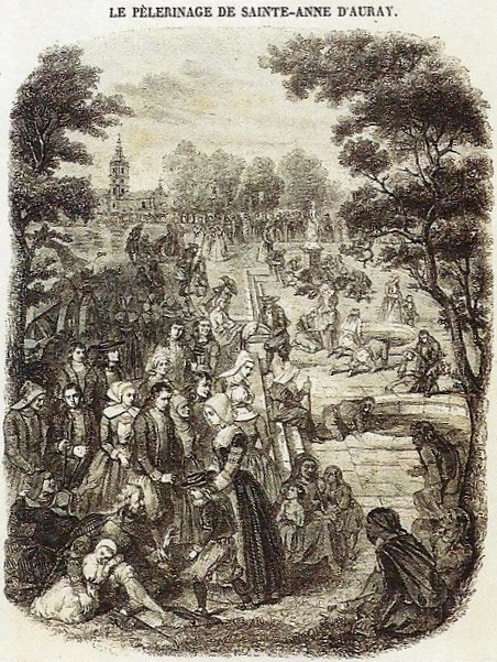 Le pèlerinage de Sainte-Anne-d'Auray en 1847 (dessin de Pitre-Chevalier, revue "Musée des familles", 1847).